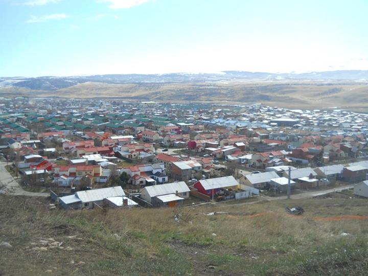 Vista a veintiocho de noviembre